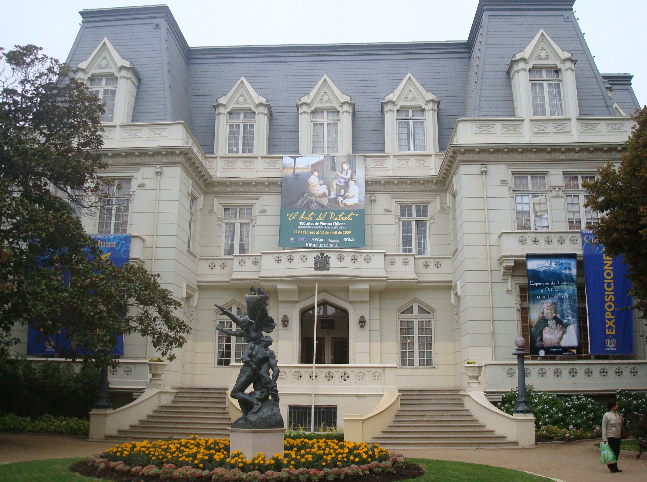 Palacio Carrasco, Viña del Mar, Chile